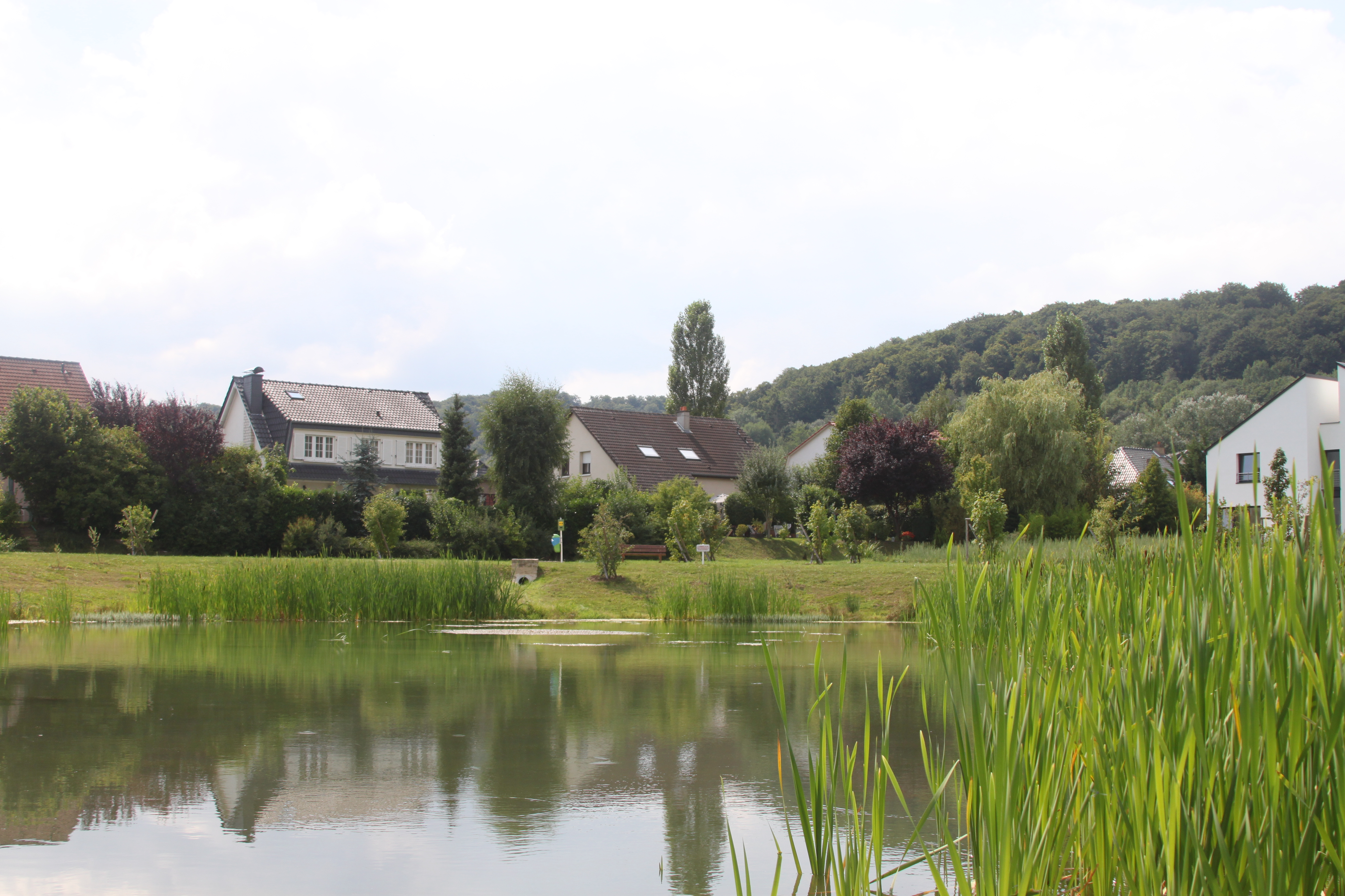 Blick über den künstlichen See in Schrassig, Luxemburg